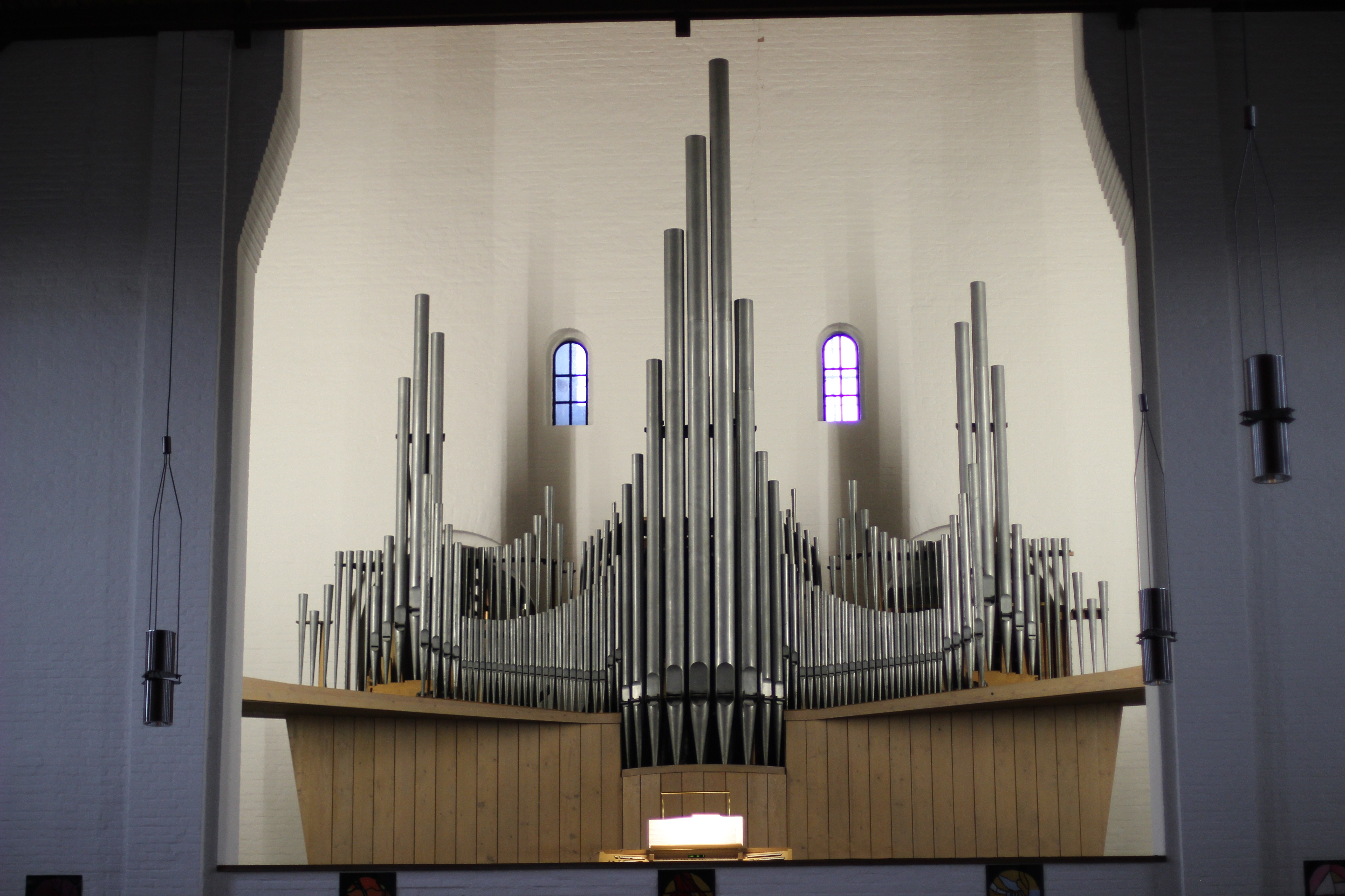 Orgel St. Thaddäus, Augsburg